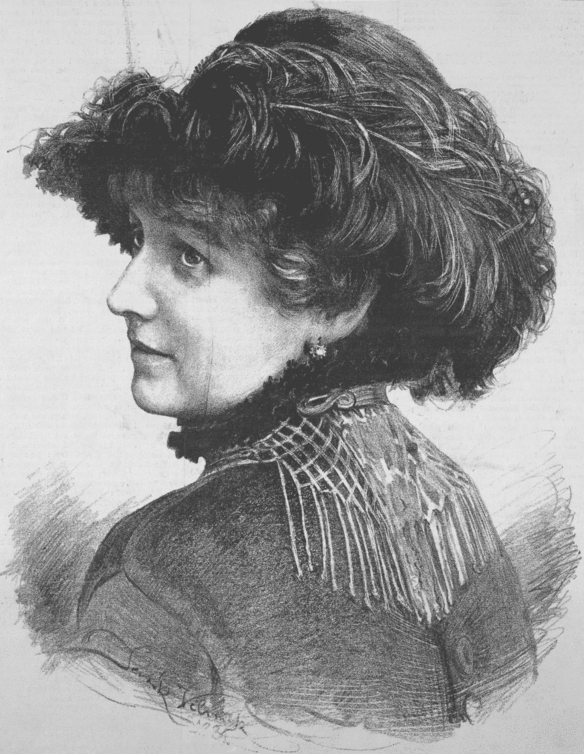 Marie Pospíšilová (1862-1943) - česká, později německá herečka